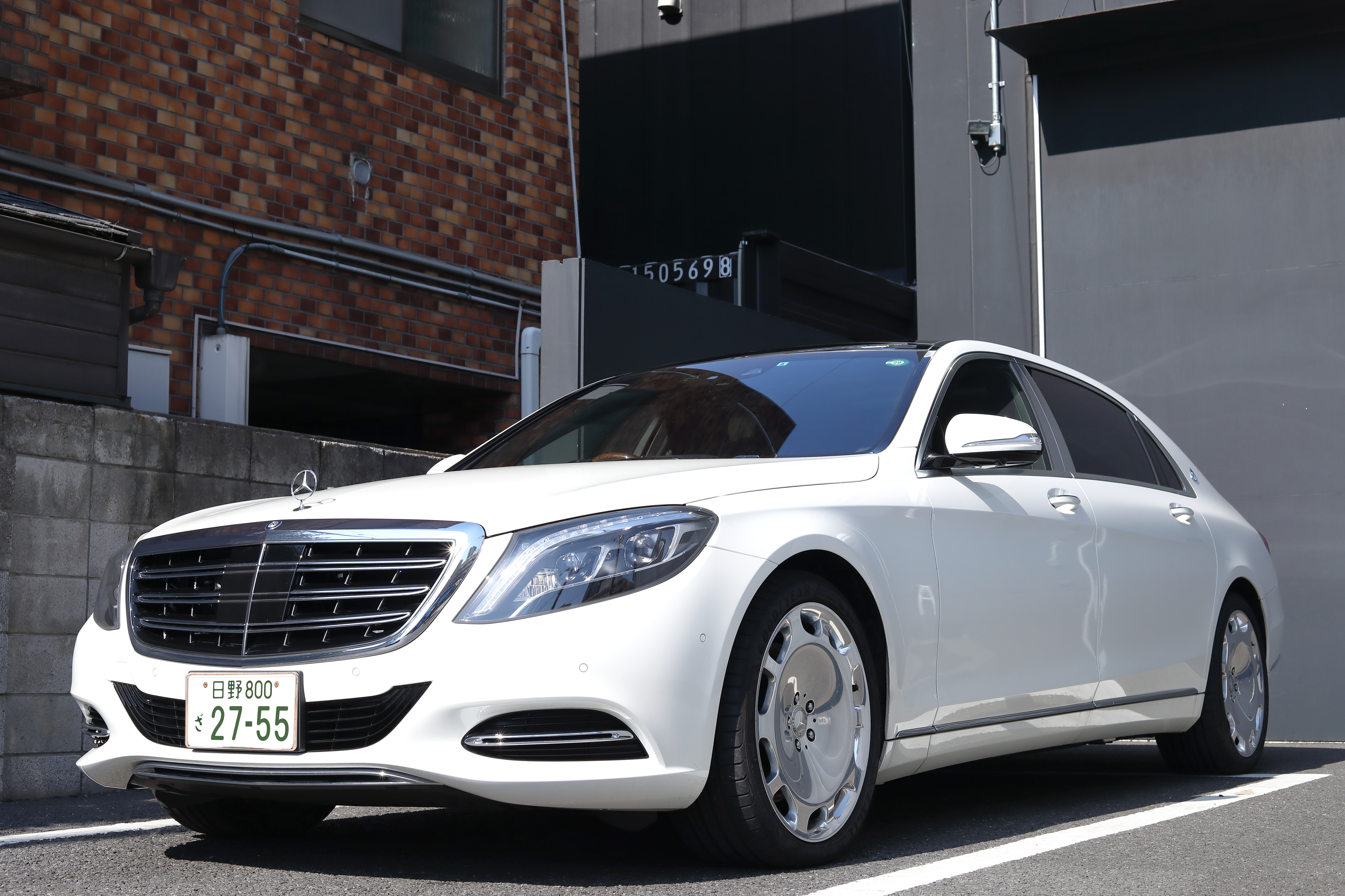 ja